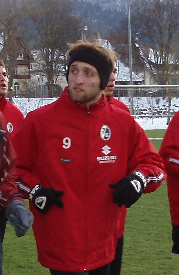 Alexander Iashvili